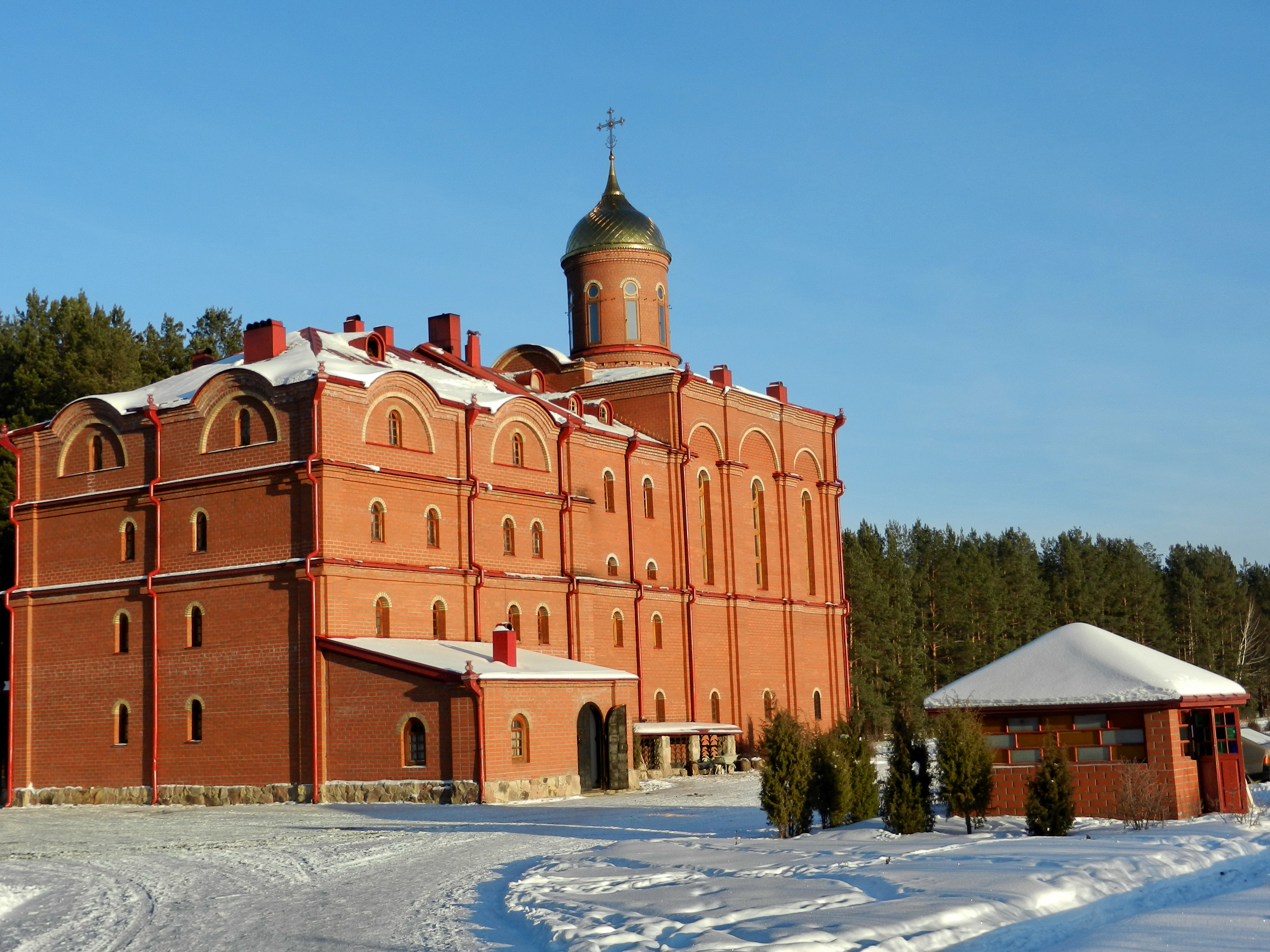 МОНАСТЫРЬ НА МЕСТЕ ГИБЕЛИ РОМАНОВЫХ